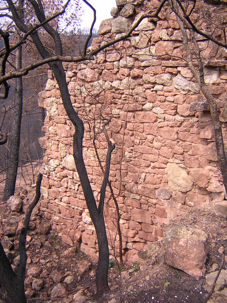 Detall de l'aparell del Casalot de la Llegenda (Monistrol de Calders, Moianès)